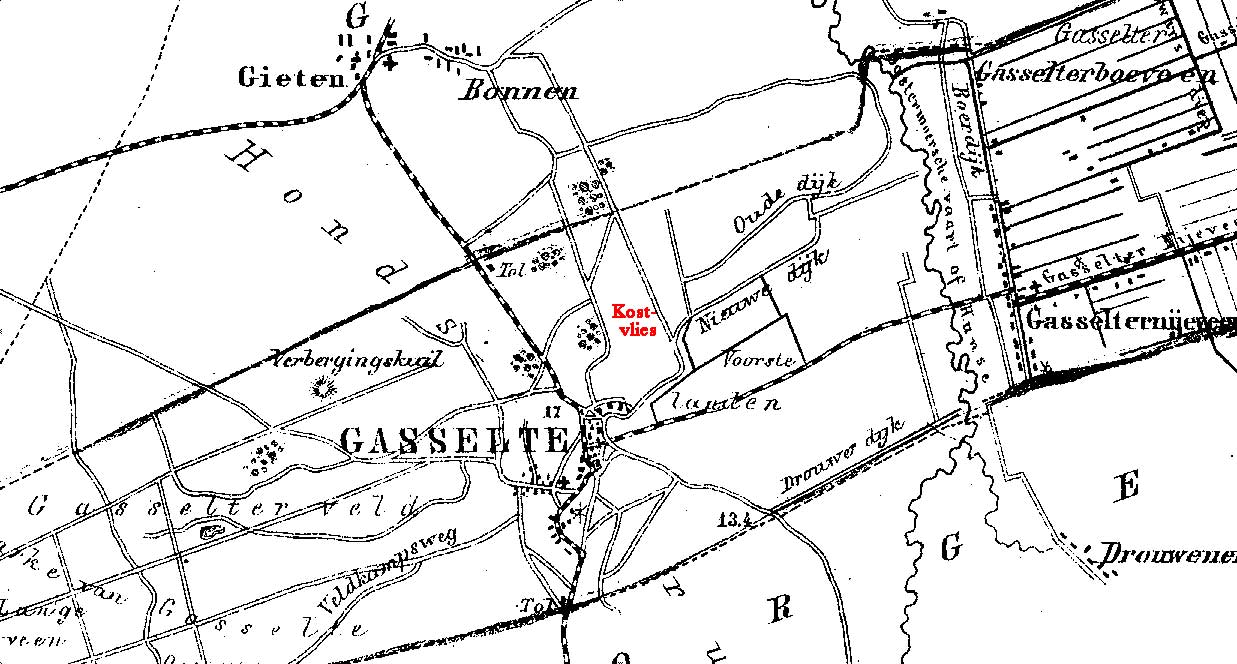 Fragment met Kostvlies van een kaart van Gasselte (Kostvlies door mijzelf aangegeven)